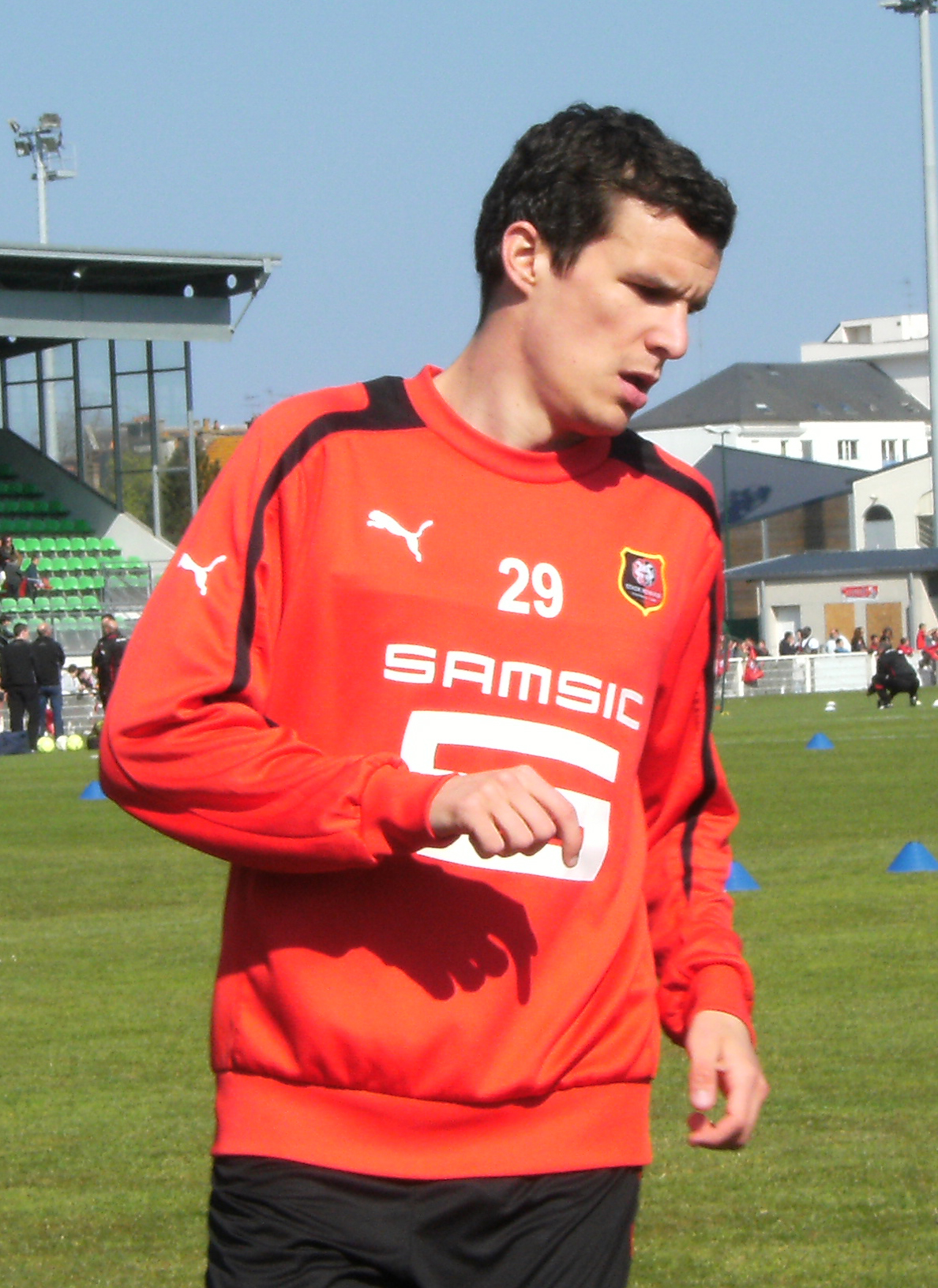 Photo prise lors d'un entraînement du Stade rennais au stade de Marville de Saint-Malo le 3 mai 2013. Romain Danzé en entraînement individualisé.